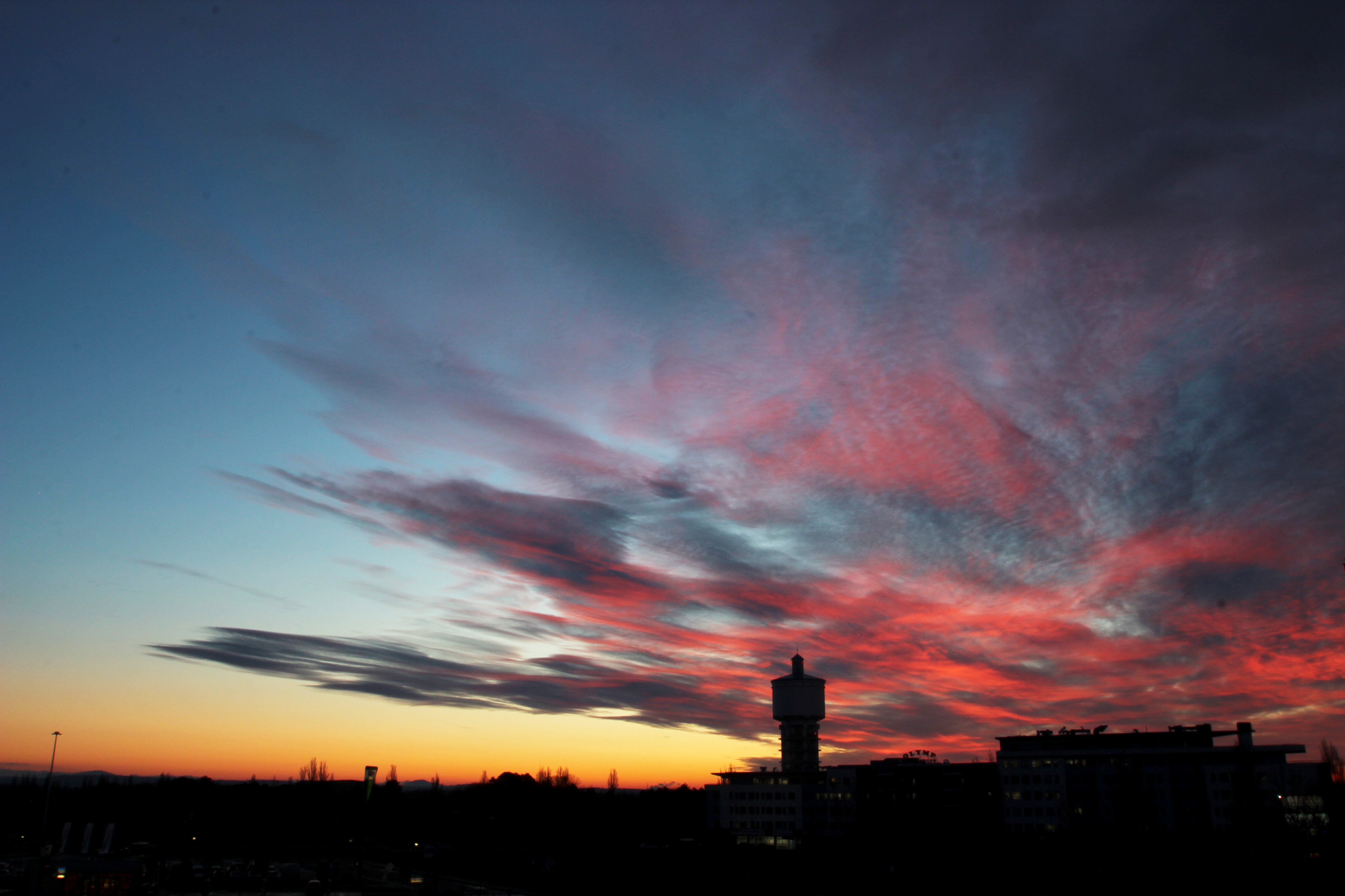 Belušov vodojem v Trnave pri východe slnka